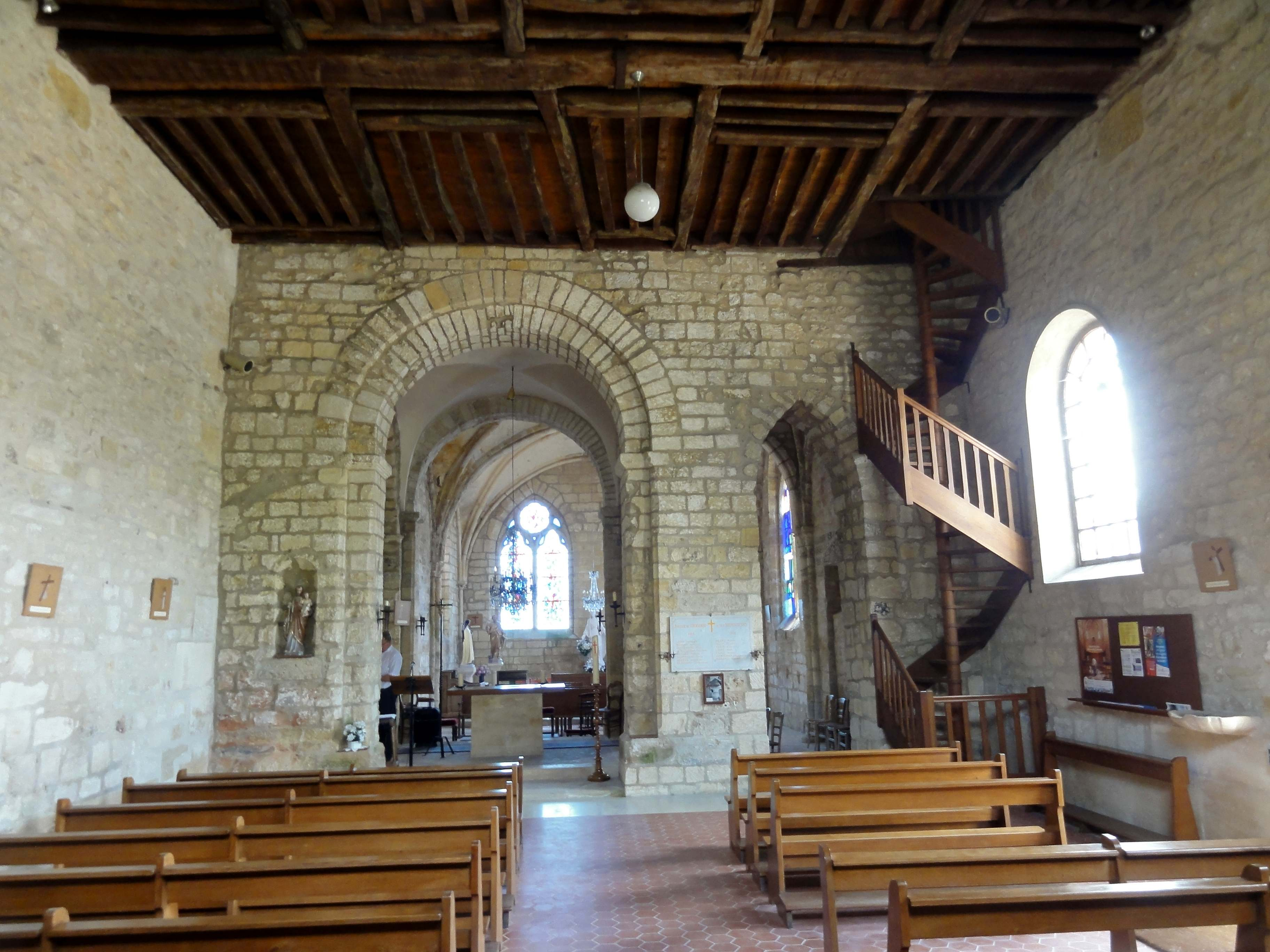 Intérieur de l'église (voir titre).